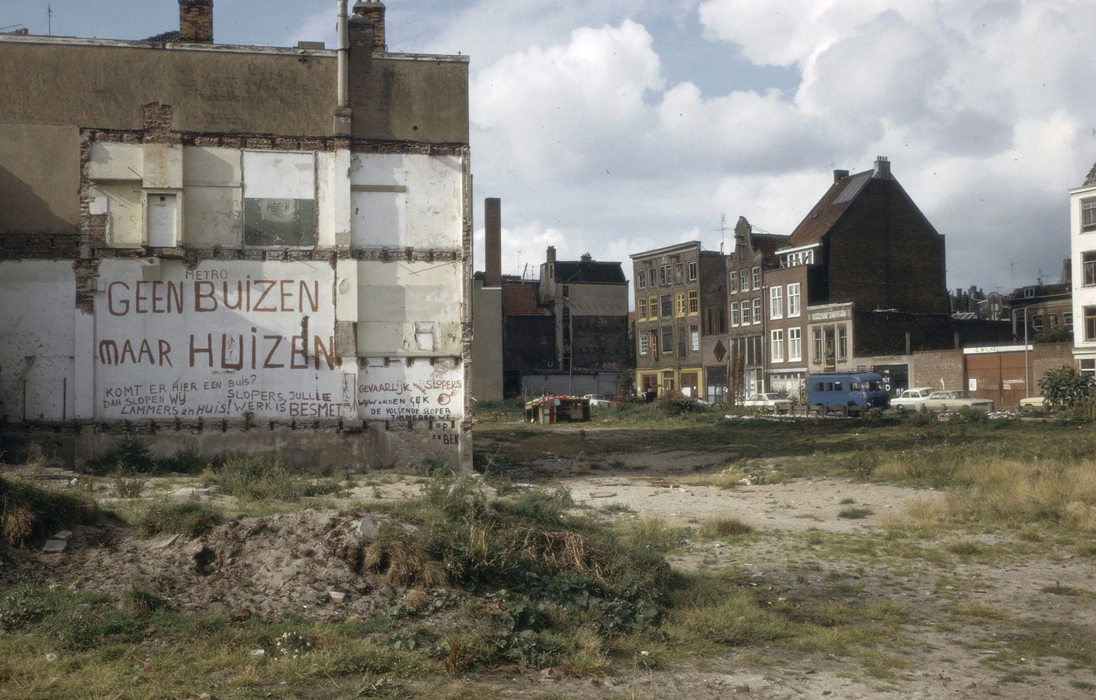 Exterieur OVERZICHT NA AFBRAAK HUIZEN This is a possible Rijksmonument: Find the monument in the Monuments database: in Amsterdam All Rijksmonumenten in Amsterdam Is this a Rijksmonument? Yes No More information about this project and help. More images to work at in Category:Possible Rijksmonumenten.